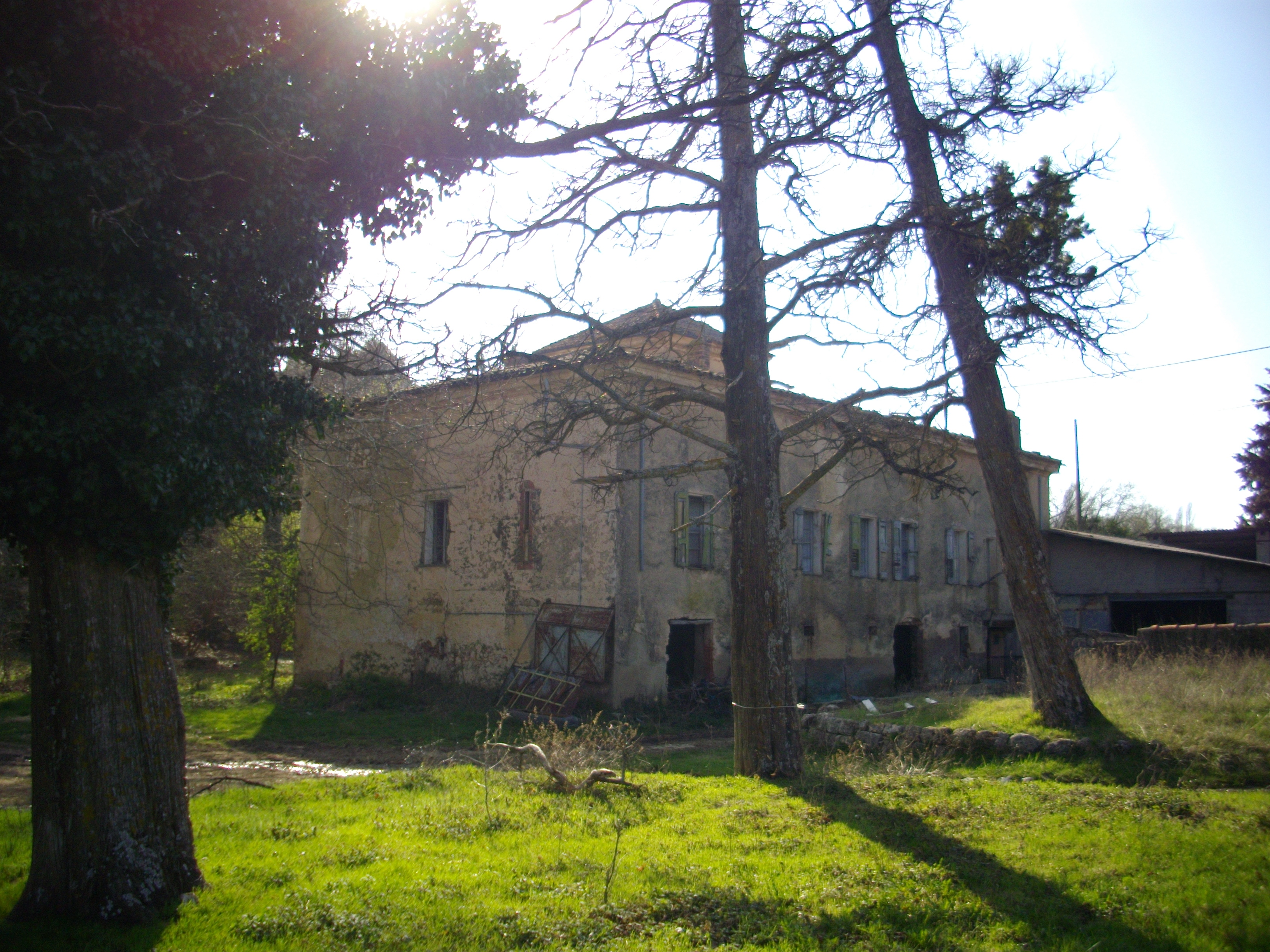 Façade principale du Moulin-Vieux à Ampus (Var) L'état général se dégrade faute d'entretien